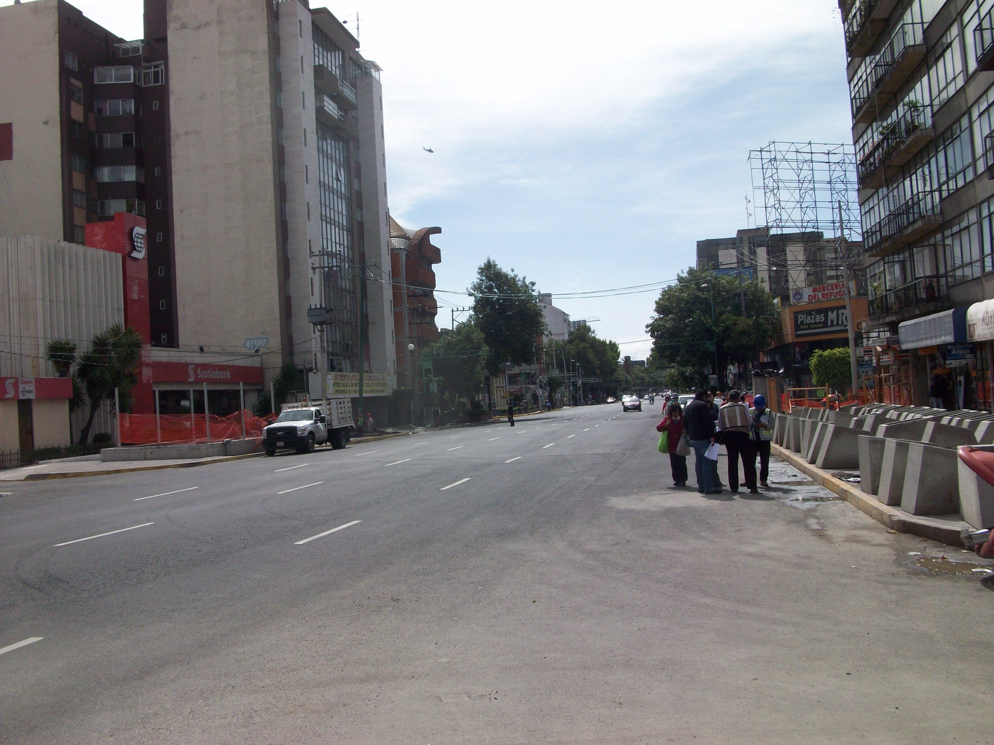 Avenida Felix Cuevas